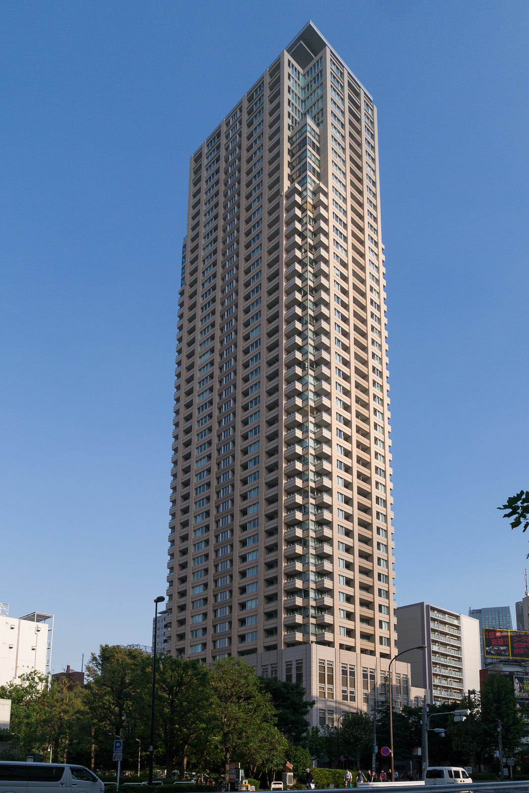 パークアクシス青山一丁目タワー、東京都港区南青山1丁目。